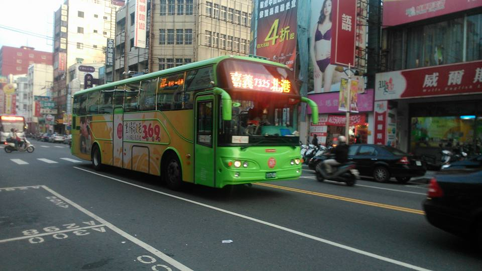 中文（台灣）: 嘉義縣公共汽車管理處日野大客車117-U9。